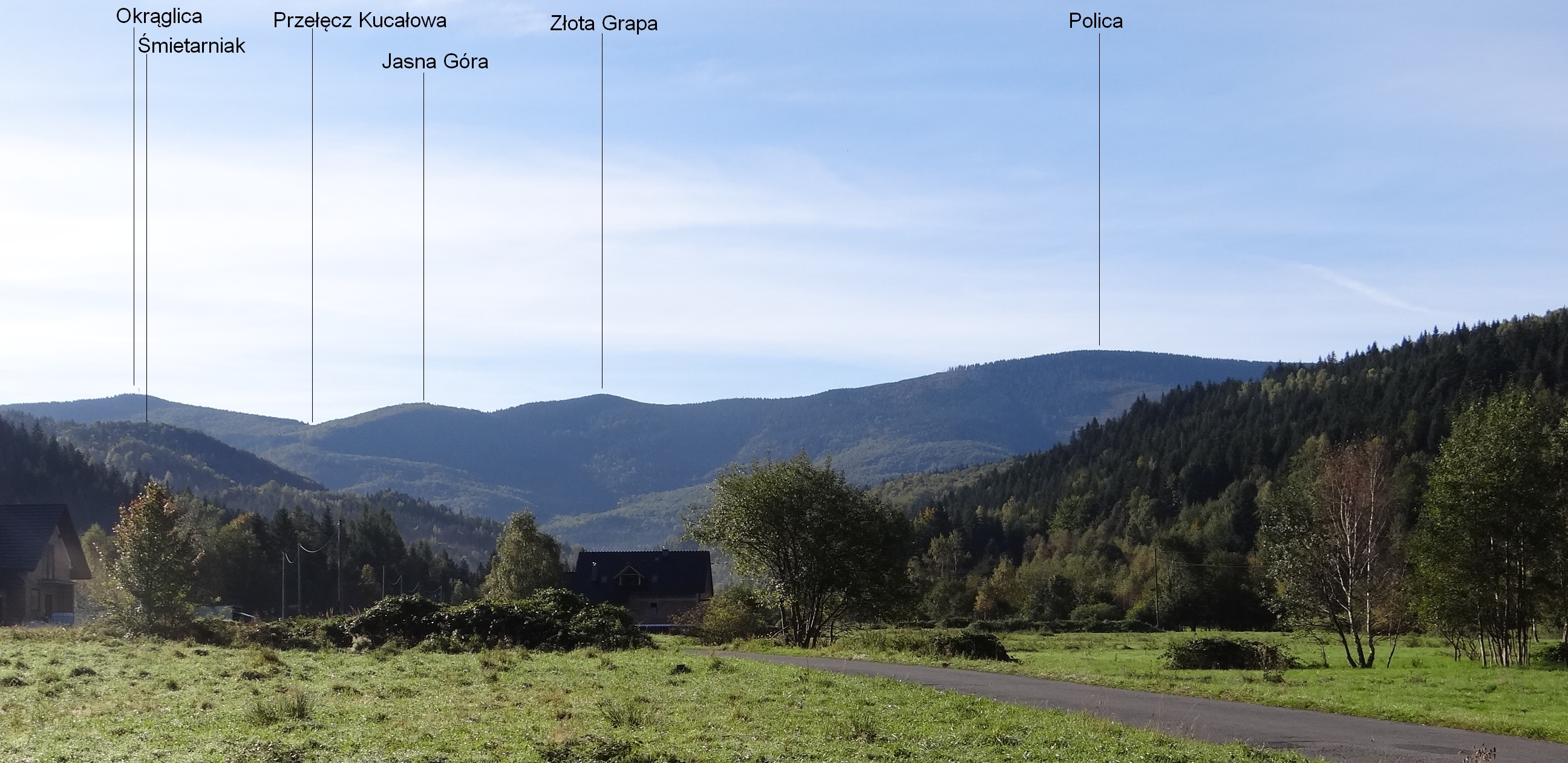 Widok ze Skawicy-Suchej Góry